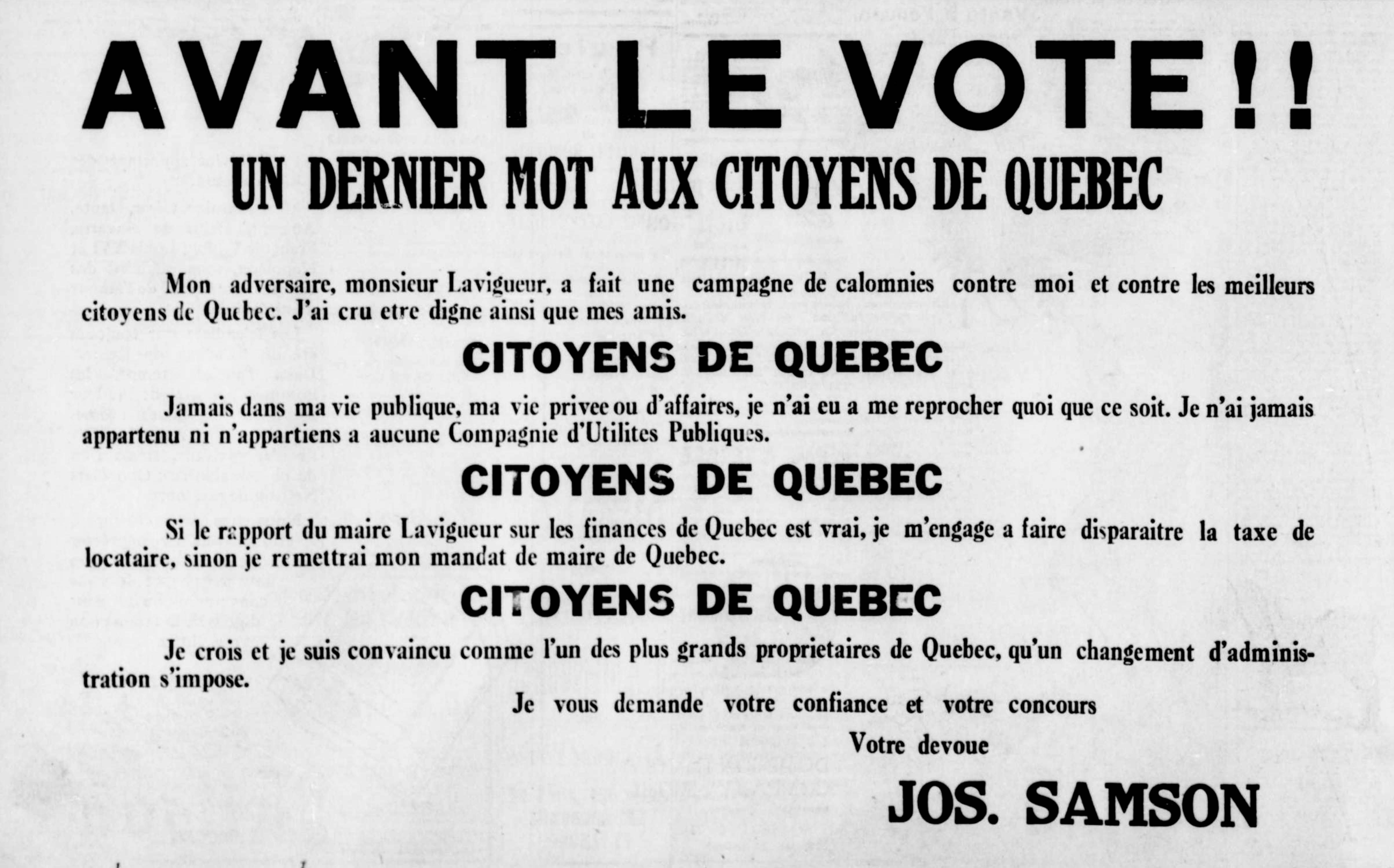 Publicité électorale de Joseph Samson, lors des élections municipales de 1920 à Québec, publiée dans l'édition du 14 février 1920 du journal Le Soleil.